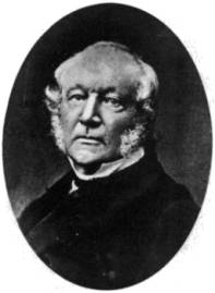 Maakonnaarst Carl Hermann Hesse (1802–1896)